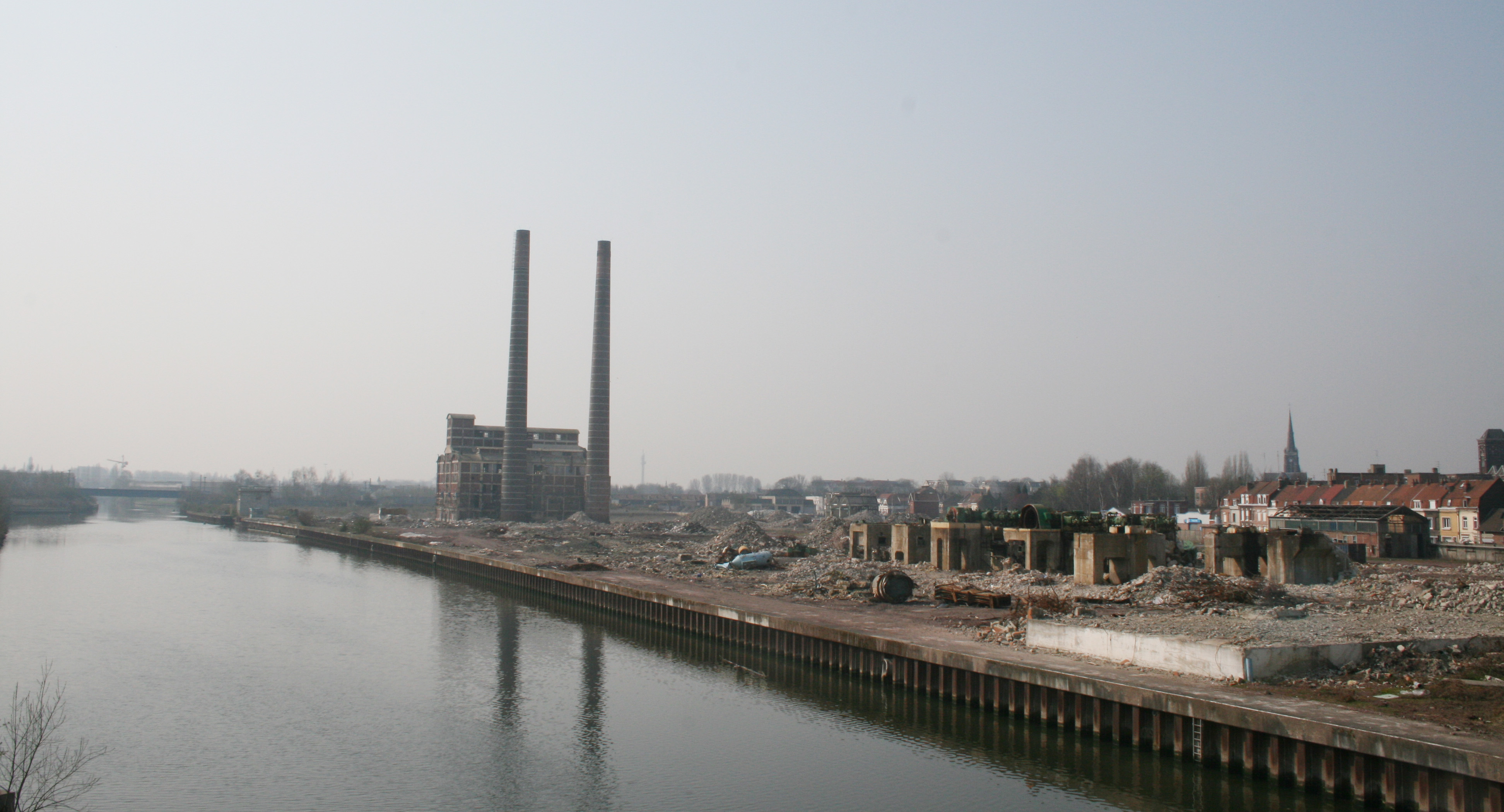 Partie rive gauche de la friche industrielle dite Friche Rhodia (anciennement "Rhône Poulenc Chimie"), le long du Canal de la Deûle en aval de Lille, sur les communes de La Madeleine, Saint-André-lez-Lille et de Marquette-lez-Lille. Ce site conserve de lourdes séquelles de pollution ( Source : Fiche Basol). La photo a été prise peu avant démolition des deux cheminées construites en 1929 et en 1933 (hautes de 80m) (Démolition des cheminées de Rhodia-St André).